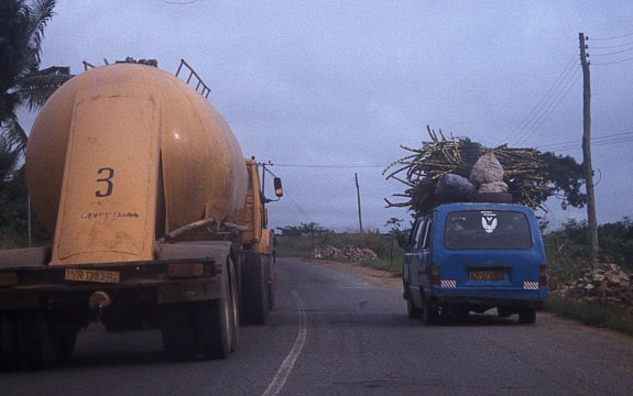 Überladenes Tro-Tro